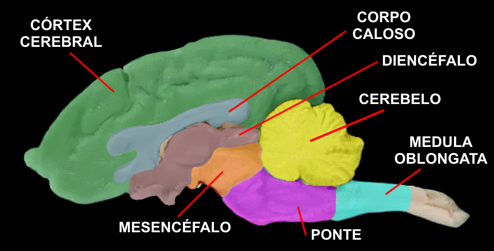 Desenho esquemático do cérebro canino